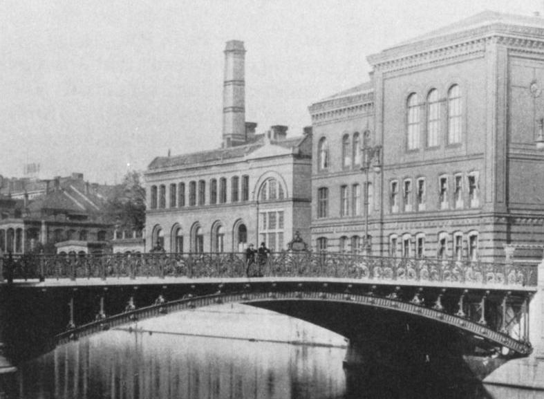 Langenbeckhaus in Berlin (links), rechts daneben das Luisen-Lyceum, im Vordergrund sieht man die Ebertbrücke